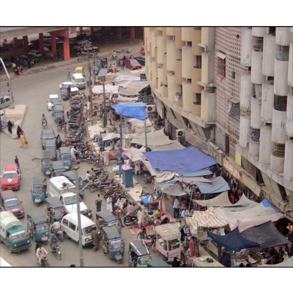 Arial view of Meena Bazaar in Karachi, Pakistan.